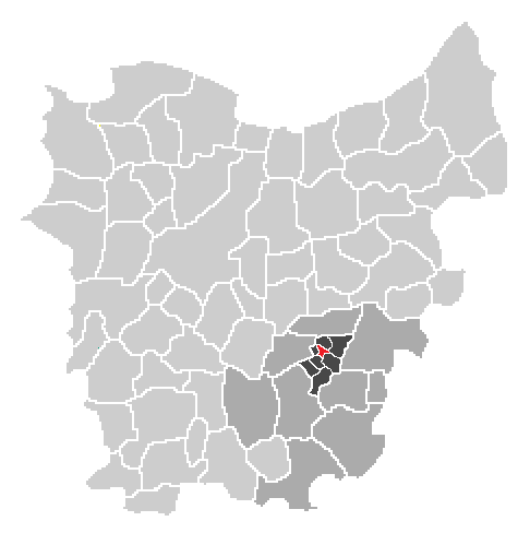 Oost-Vlaanderen uitgeknipt en bewerkt